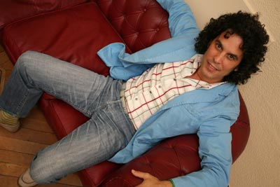 Pedro Zerolo, en el sofá del vestíbulo de 20minutos (Foto: Sergio González)